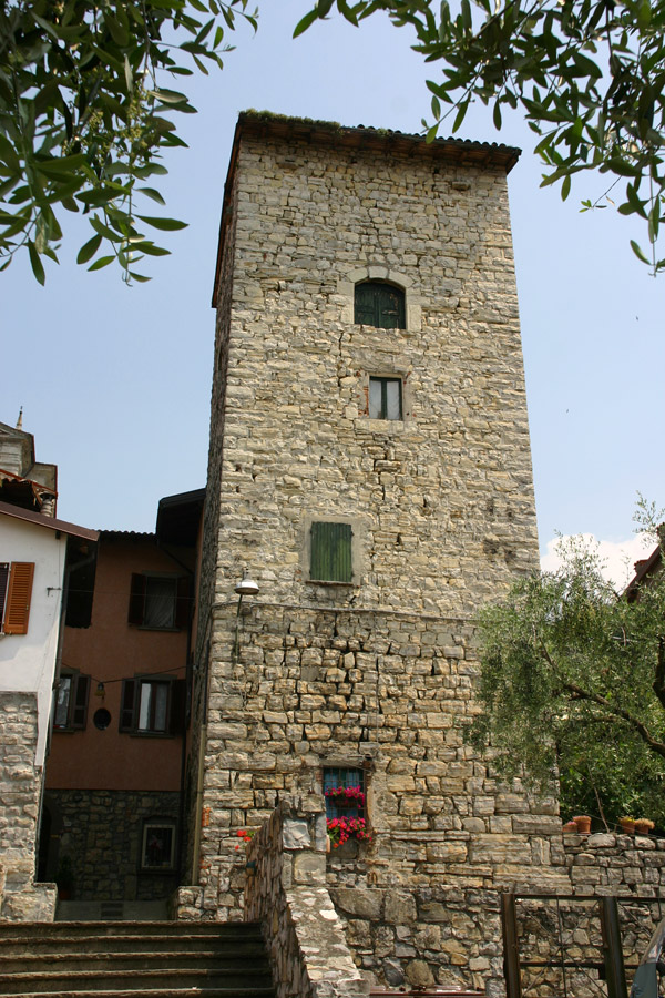 La Torre Martinengo a Siviano, frazione di Monte Isola (BS)